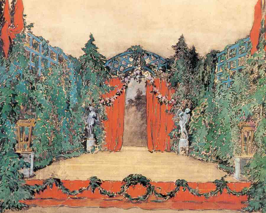 Сильфида. А. Бенуа.